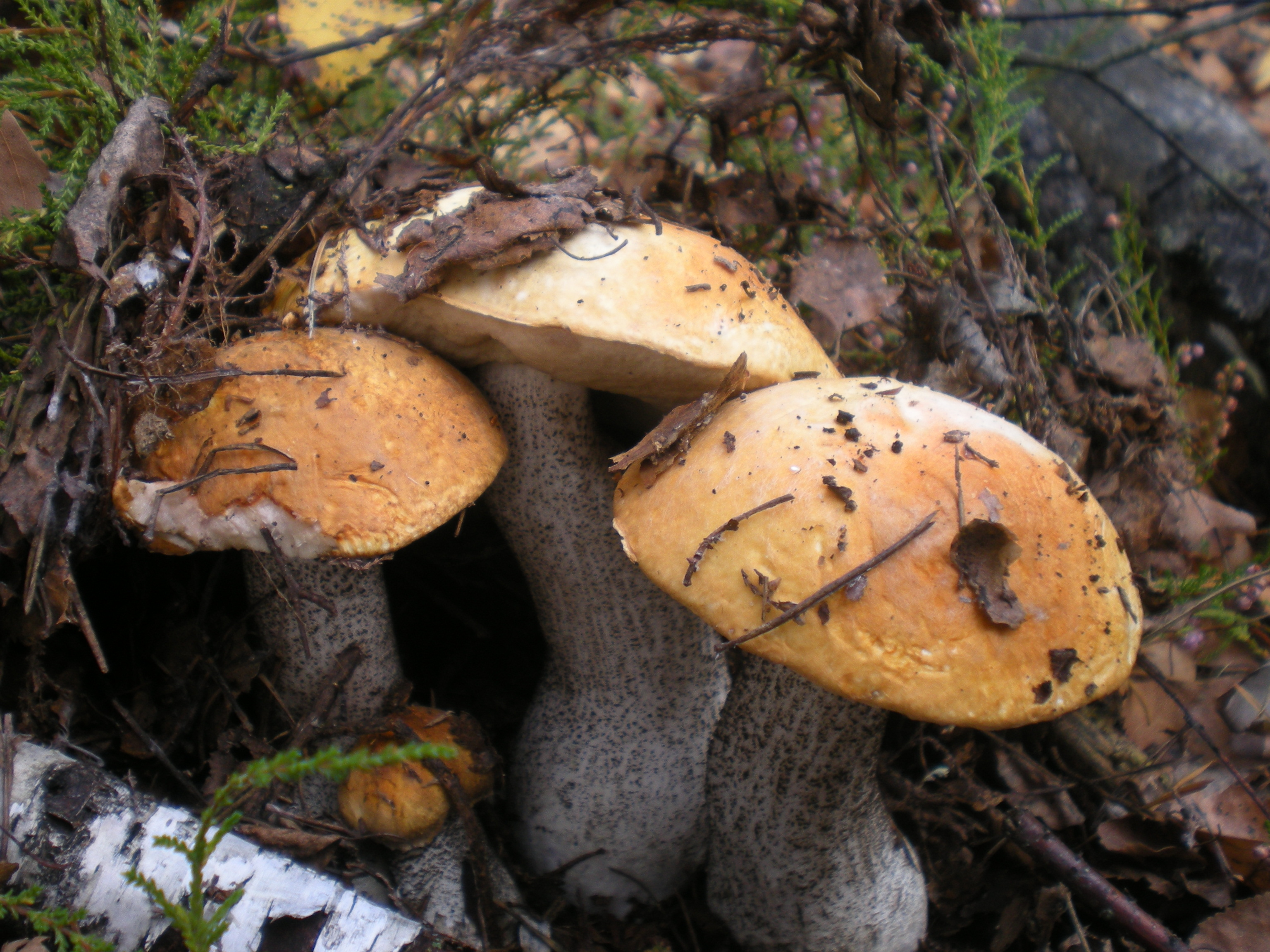 Koźlarz pomarańczowy, koźlarz pomarańczowożółty (Leccinum versipelle), Wólka Łękawska, Polska, 51°18'24"N, 19°23'34"E (51.3065, 19.3928)